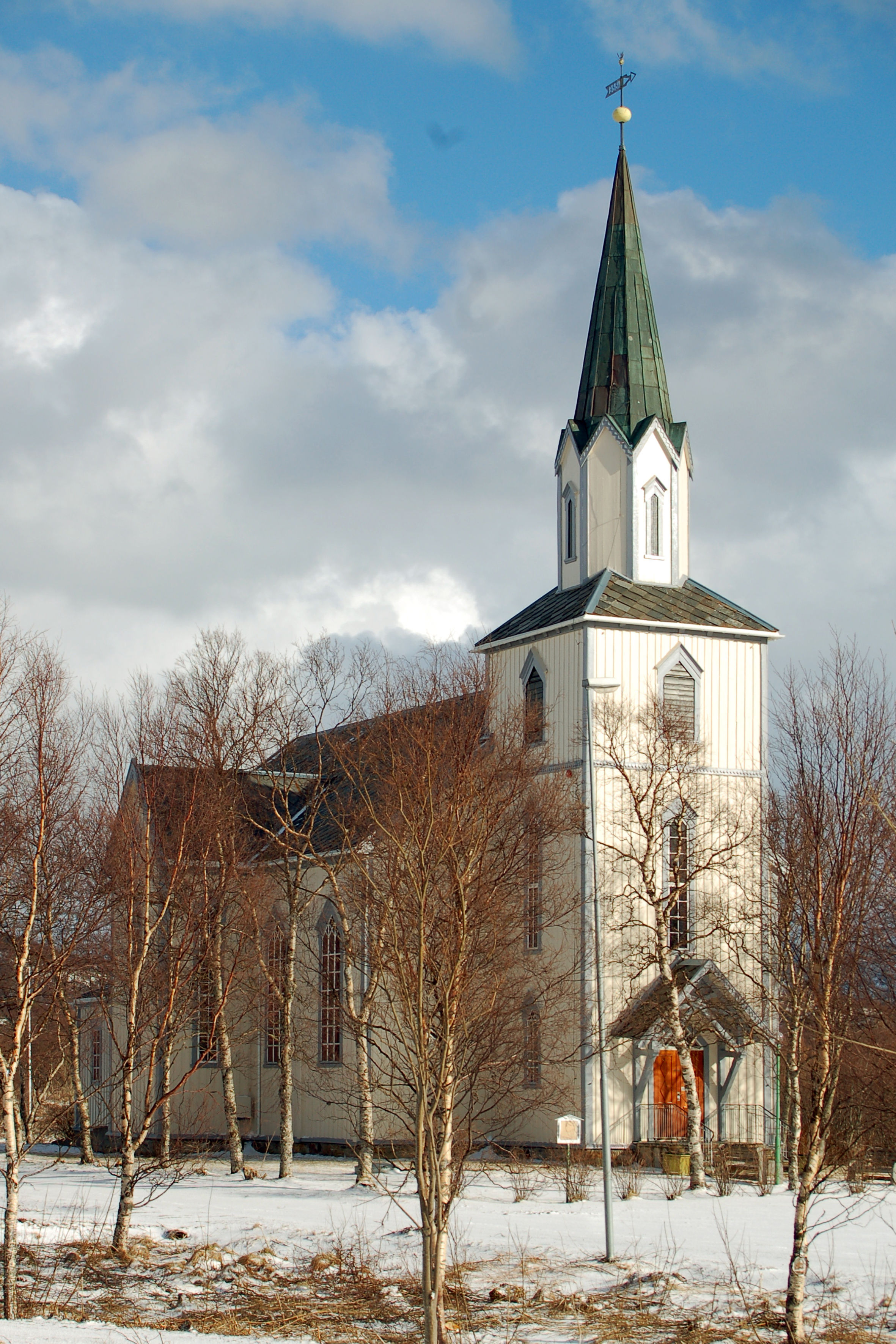 Saltstraumen church